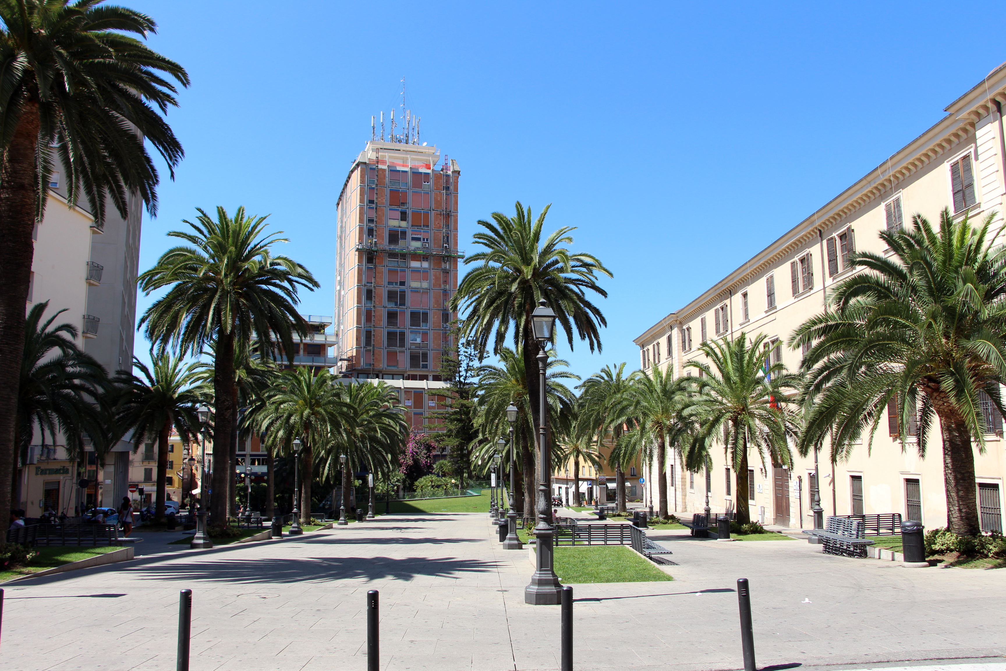 Sassari